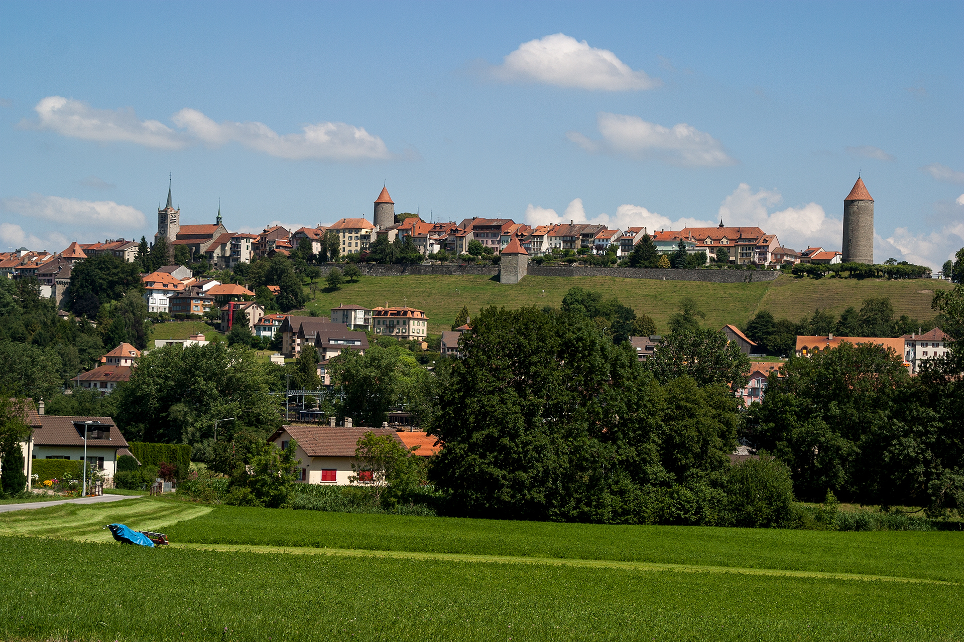 Romont (FR)